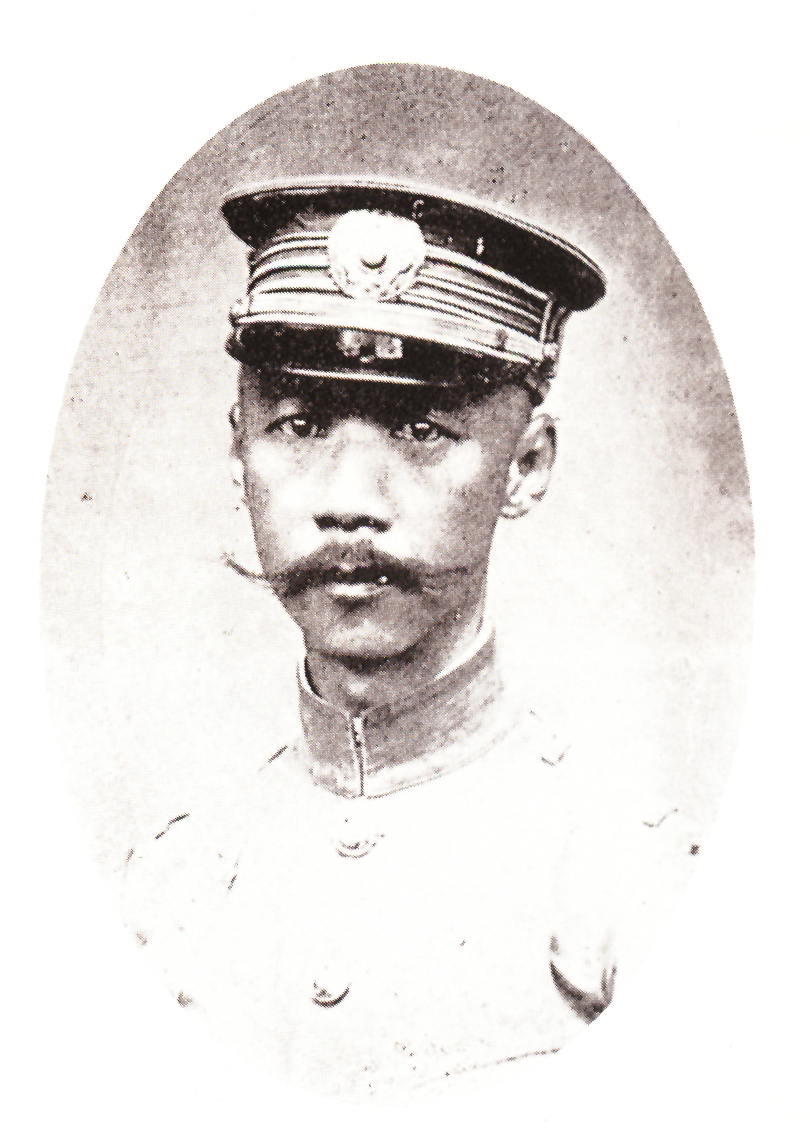 廕昌（1859年－1928年）